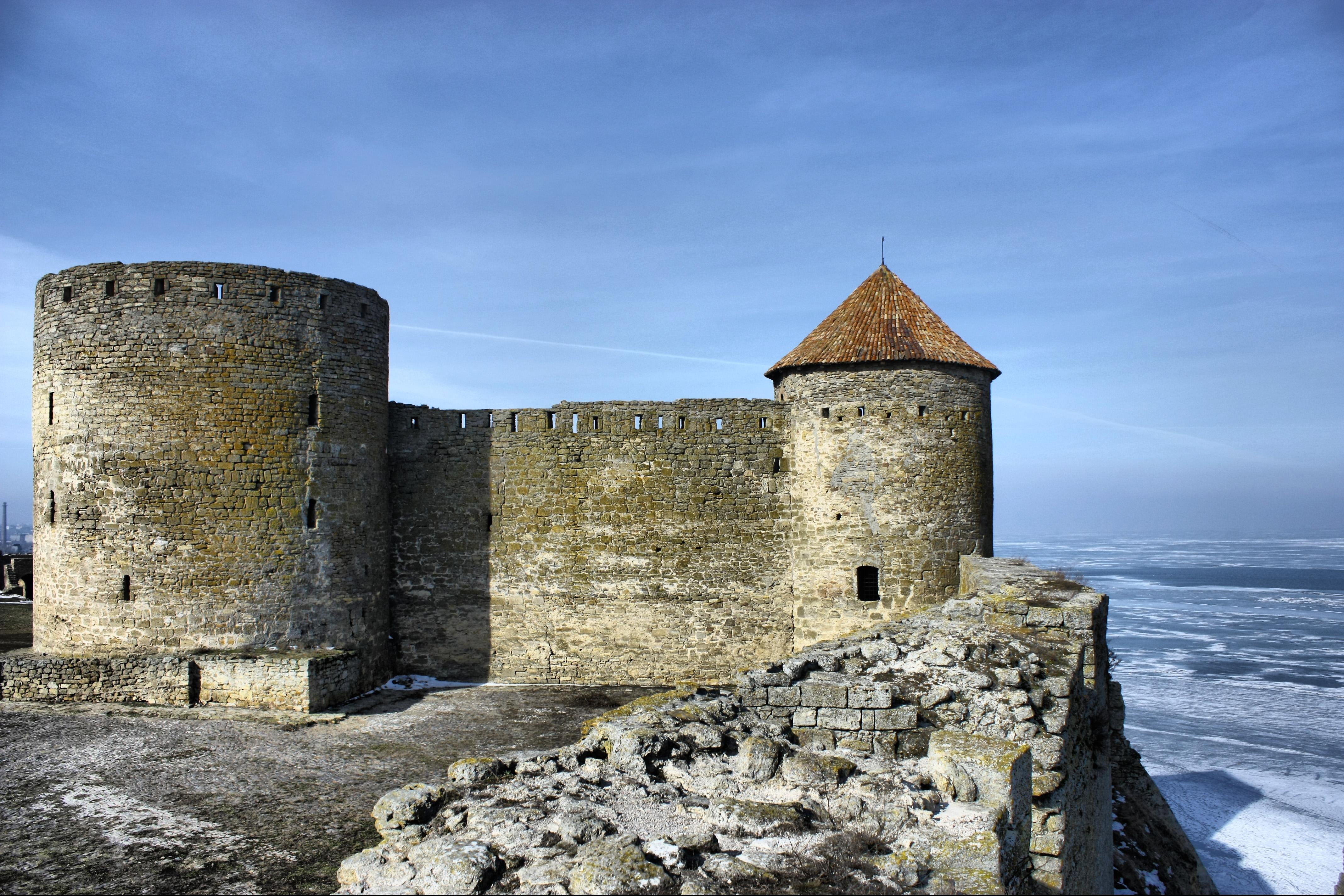 Акерманська фортеця (комплекс), Білгород-Дністровський, фортеця